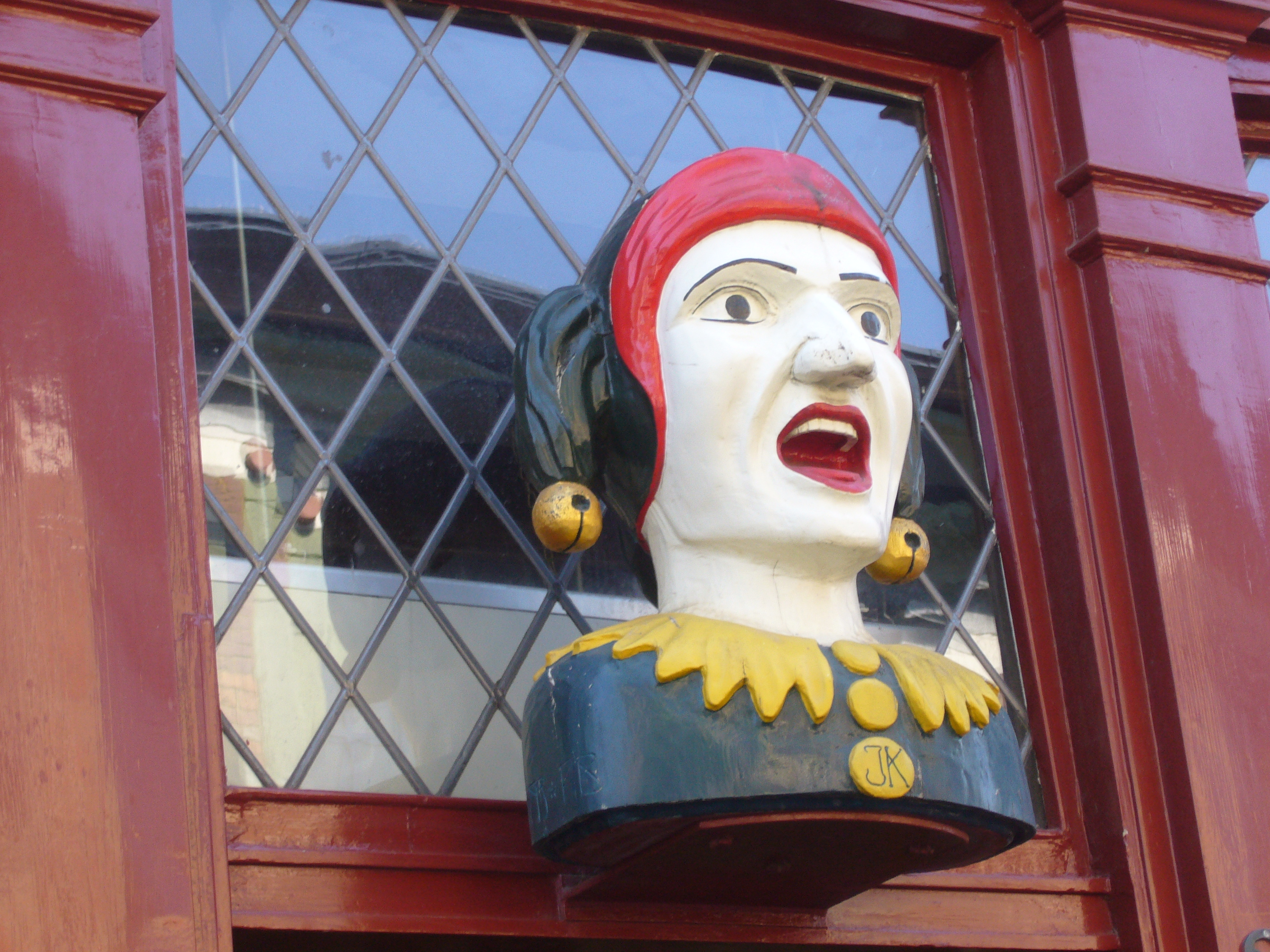 Gaper uit 1797, Groenmarkt Den Haag